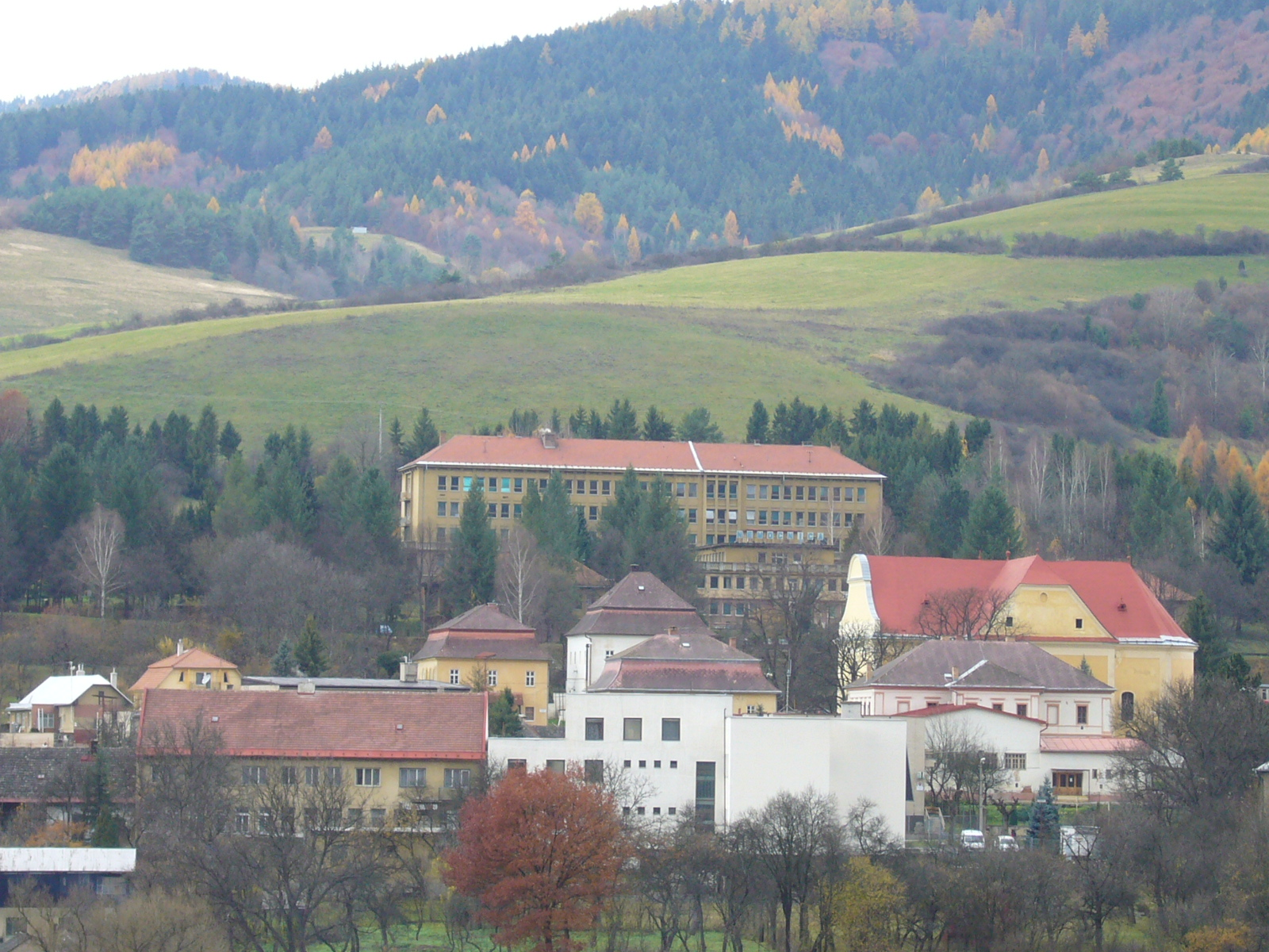 Pohľad na Nemocnicu s poliklinikou v Gelnici z protiľahlej strany doliny.